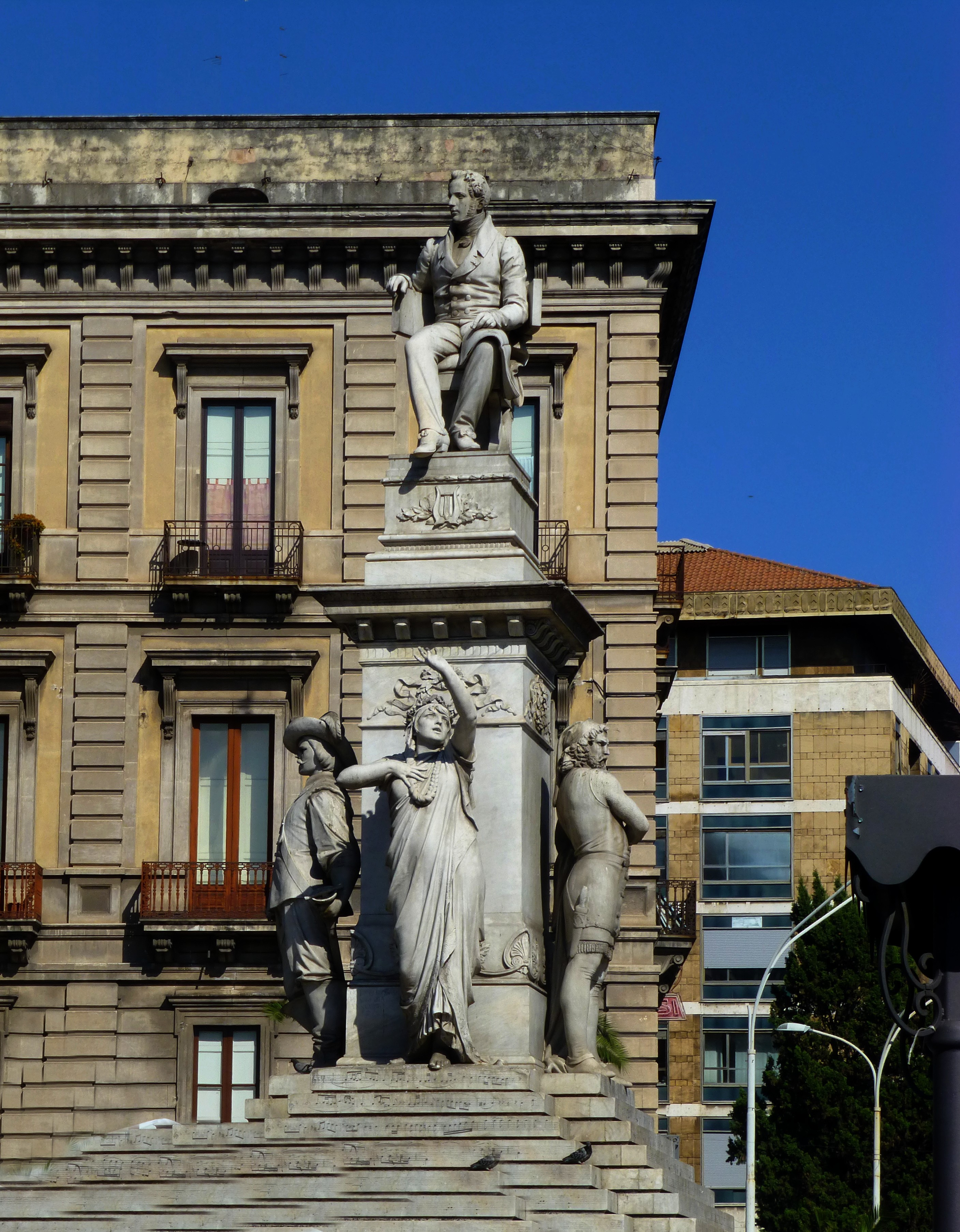 Catania - Monumento a Vincenzo Bellini